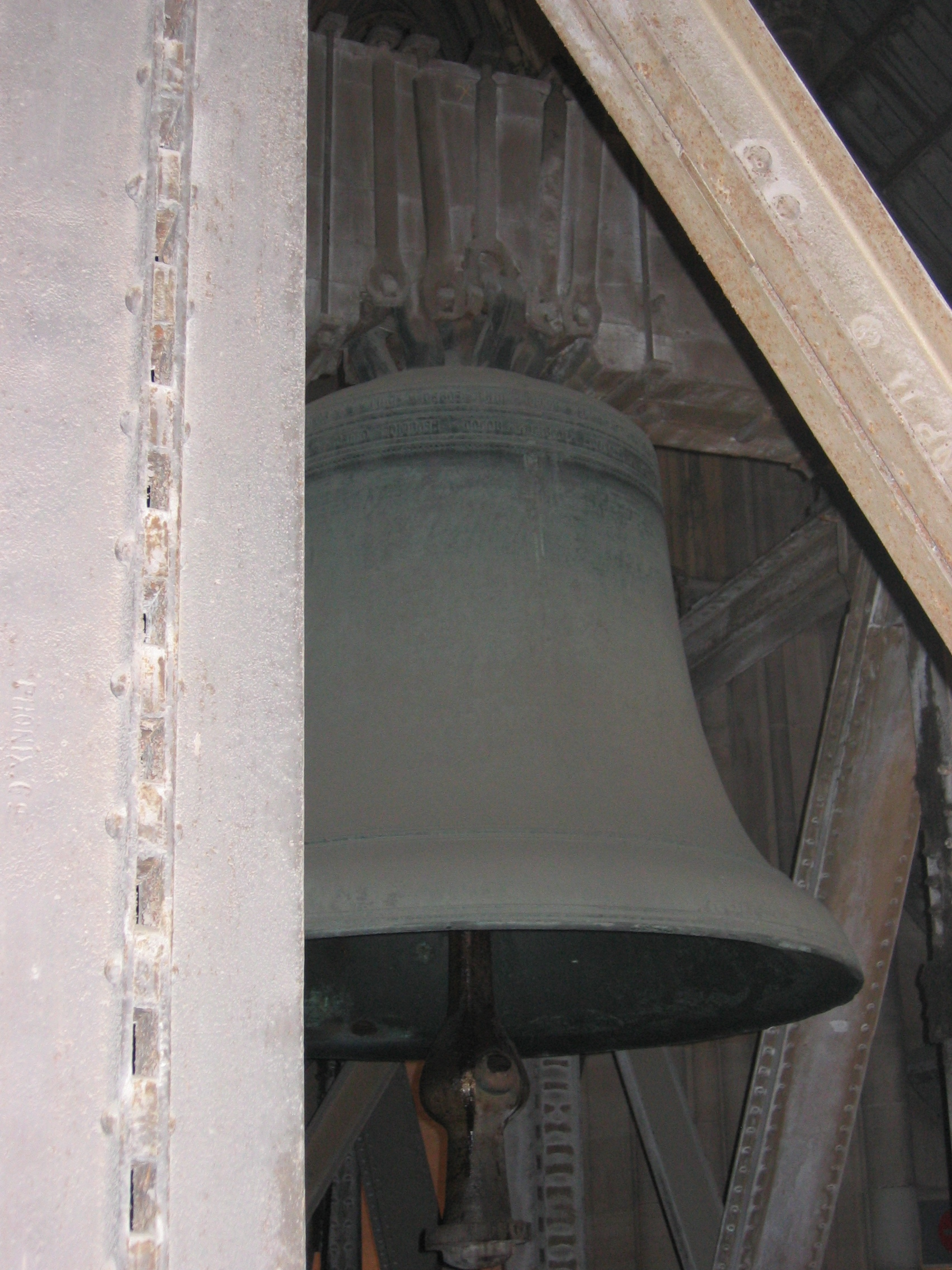 Description – Speciosa. Drittgrößte Glocke des Kölner Domes. Source – own work Date – Sommer 2006. Author – Andreasdziewior Lizenz - s. unten